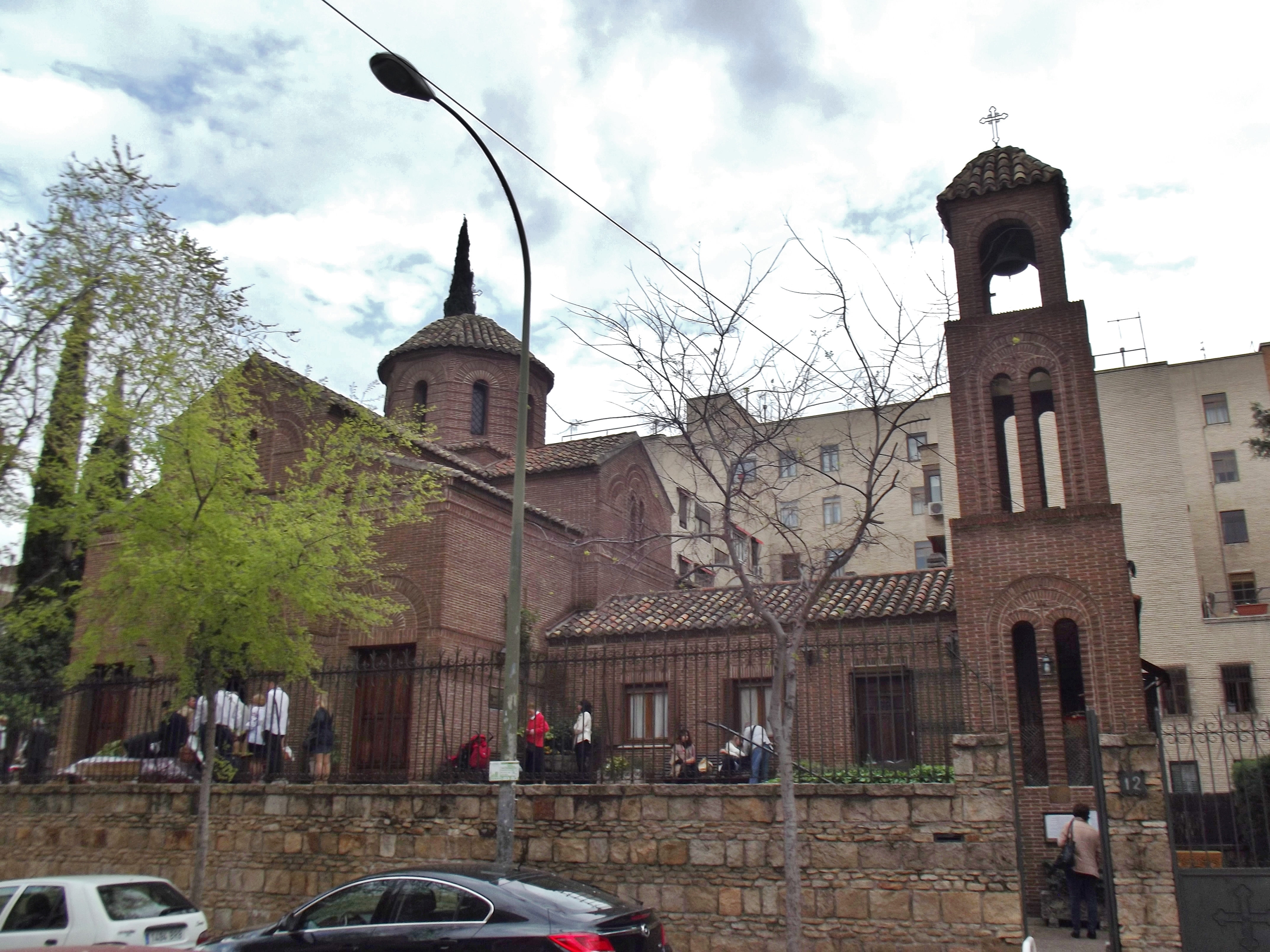 Iglesia ortodoxa de los Santos Andrés y Demetrio, Madrid.